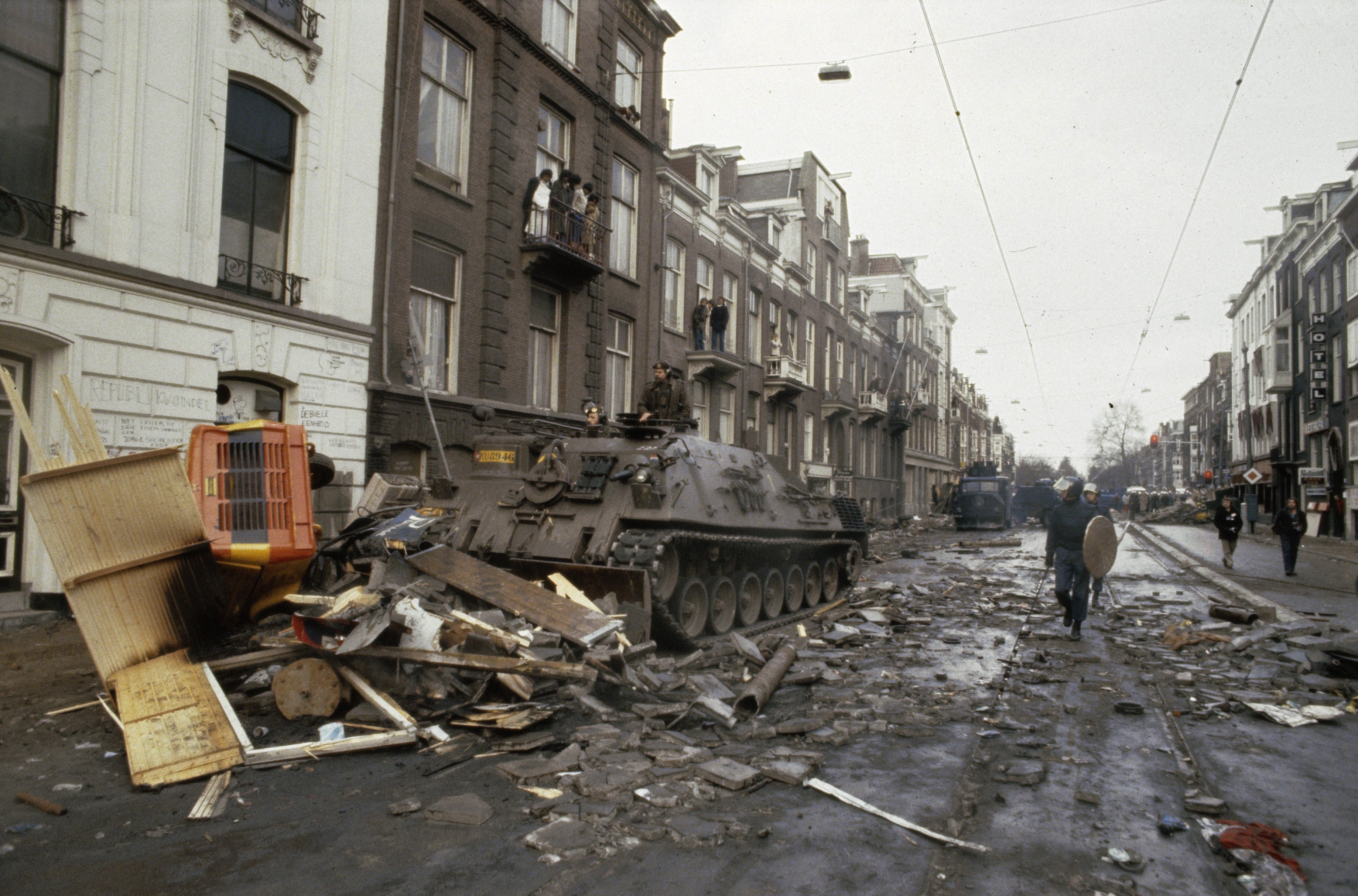 Collectie / Archief : Fotocollectie Anefo Reportage / Serie : [ onbekend ] Beschrijving : Mobiele Eenheid , tanks en pantservoertuigen ruimen barricades rond kraakpand in Vondelbuurt Amsterdam; Centuriantank in aktie Datum : februari 1980 Locatie : Amsterdam, Noord-Holland Trefwoorden : Mobiele Eenheid, TANKS, kraakpanden Fotograaf : Croes, Rob C. / Anefo Auteursrechthebbende : Nationaal Archief Materiaalsoort : Dia (kleur) Nummer archiefinventaris : bekijk toegang 2.24.01.06 Bestanddeelnummer : 253-8150